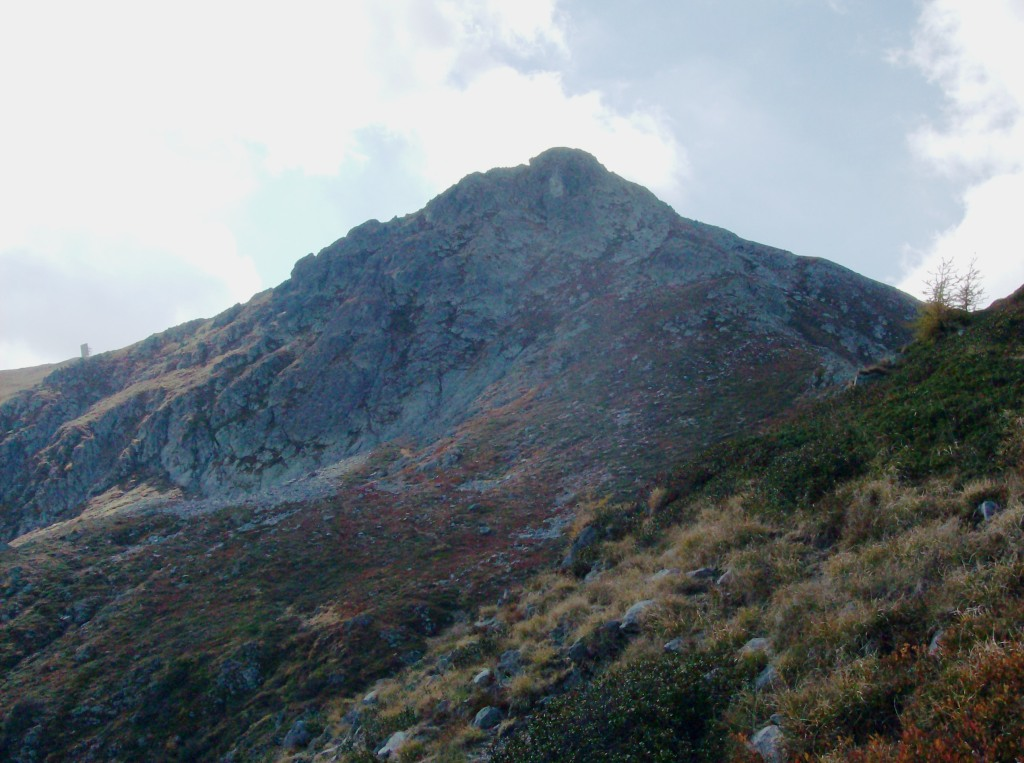 Pizzo d'Ormea visto dalla cresta nord-est (verso Cima Ferrarine)